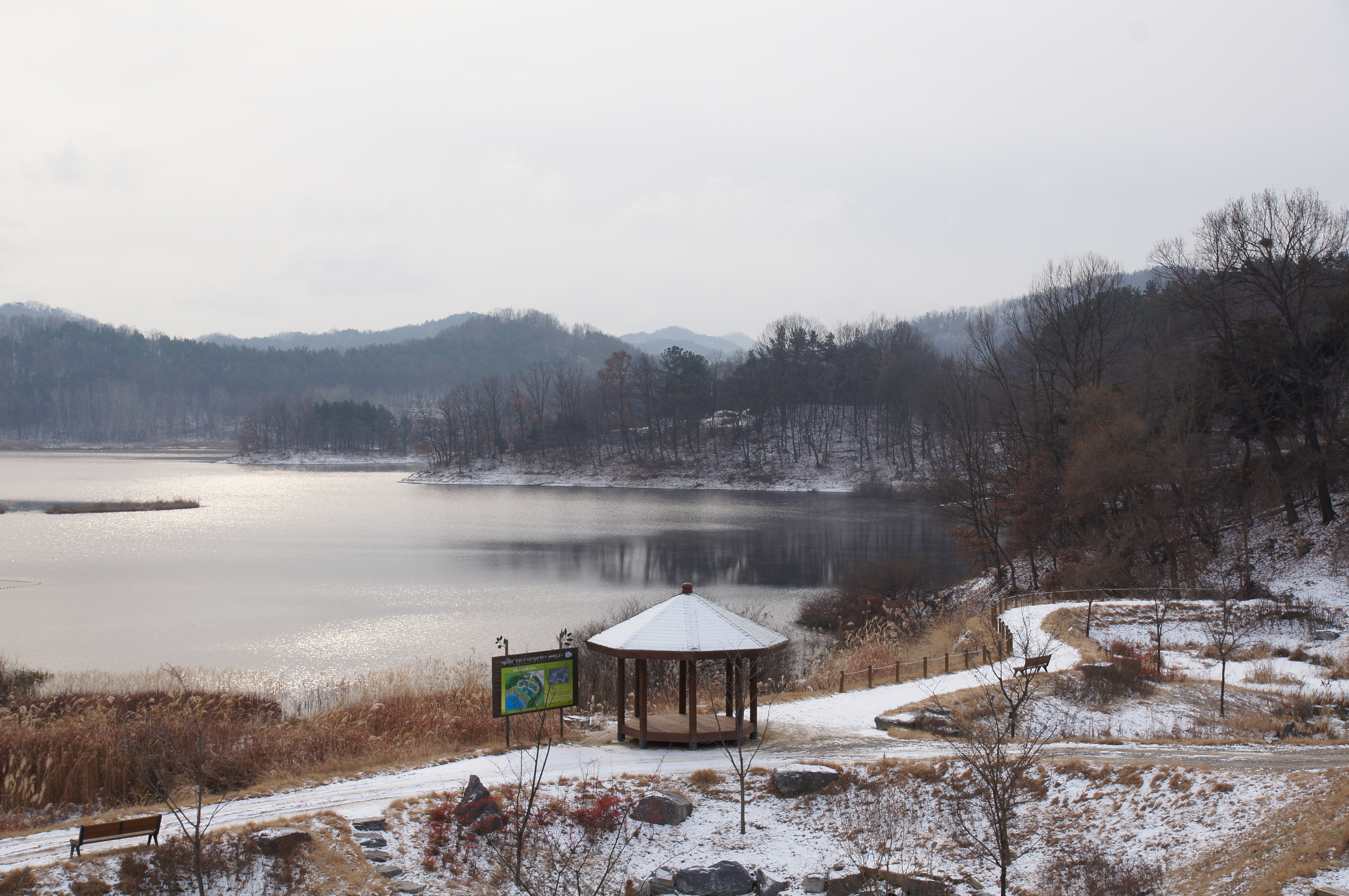 대청호오백리길 1구간_5